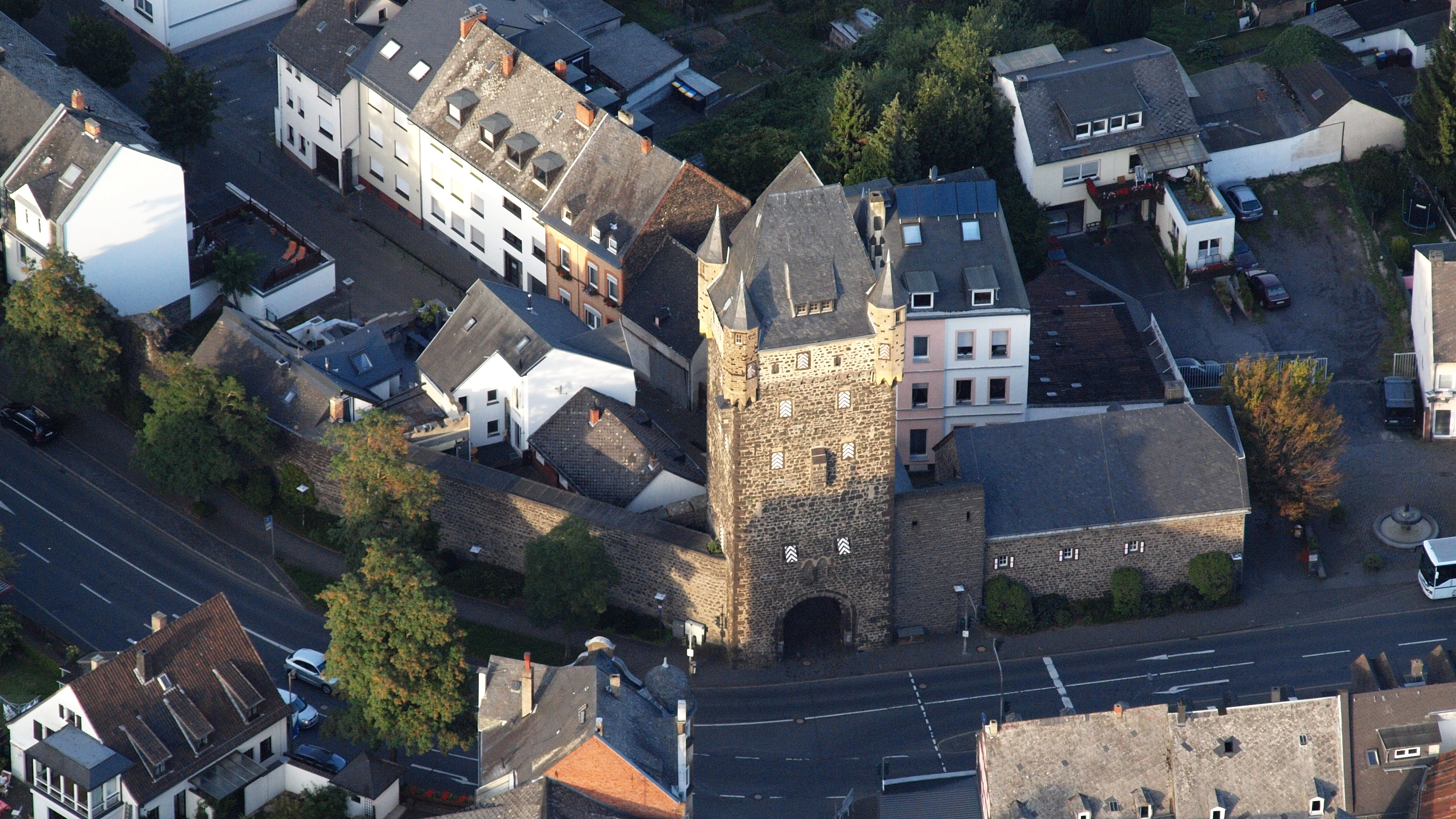 Mayen, Obertor, Luftaufnahme (2015)